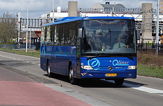 Een Mercedes-Benz Integro als treinvervangend vervoer naar Purmerend Overwhere (hoewel het bestemmingsdisplay Purmerend Station toont)